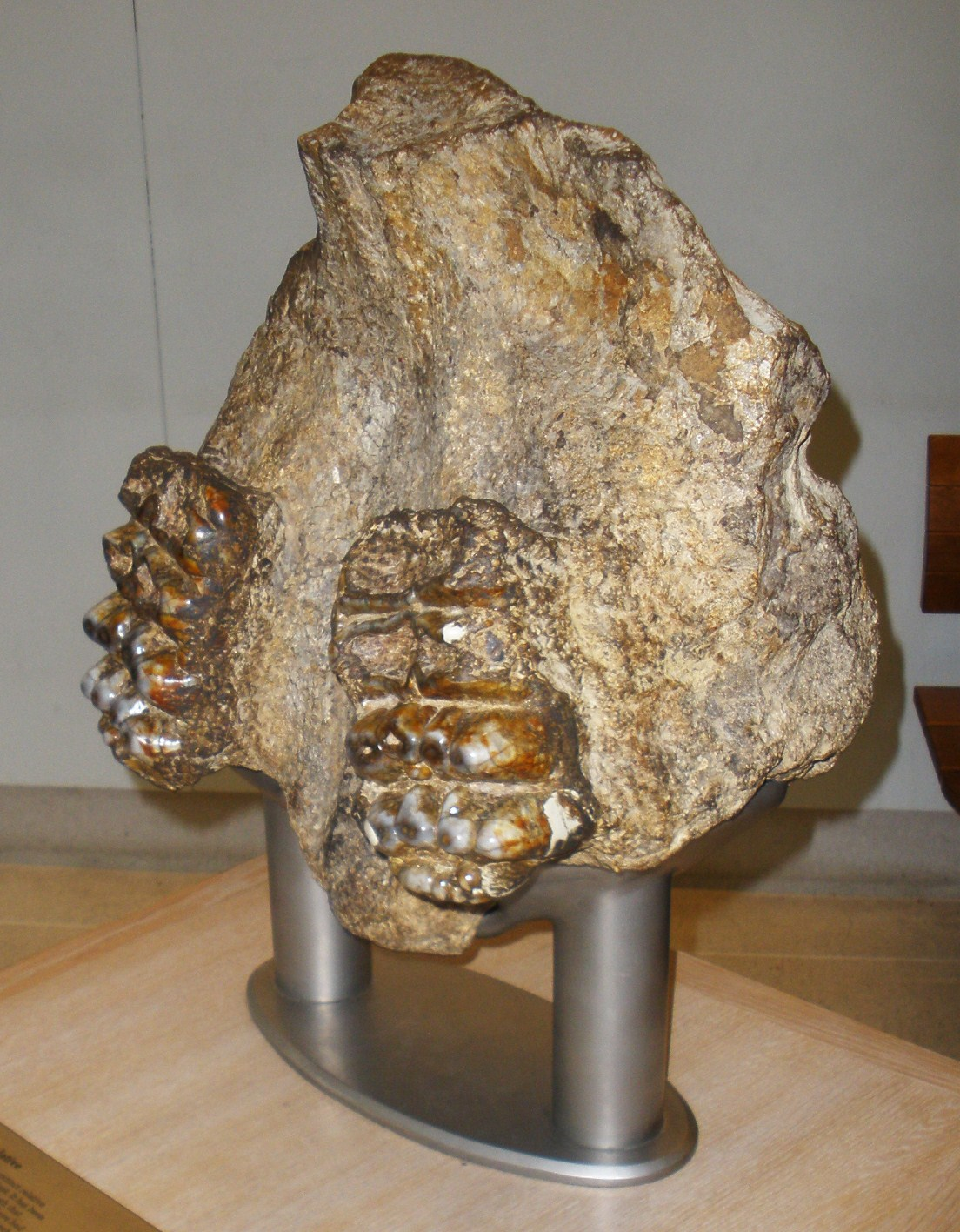 Fossil of Stegolophodon, an extinct mammal-- Took the photo at Natural History Museum, London